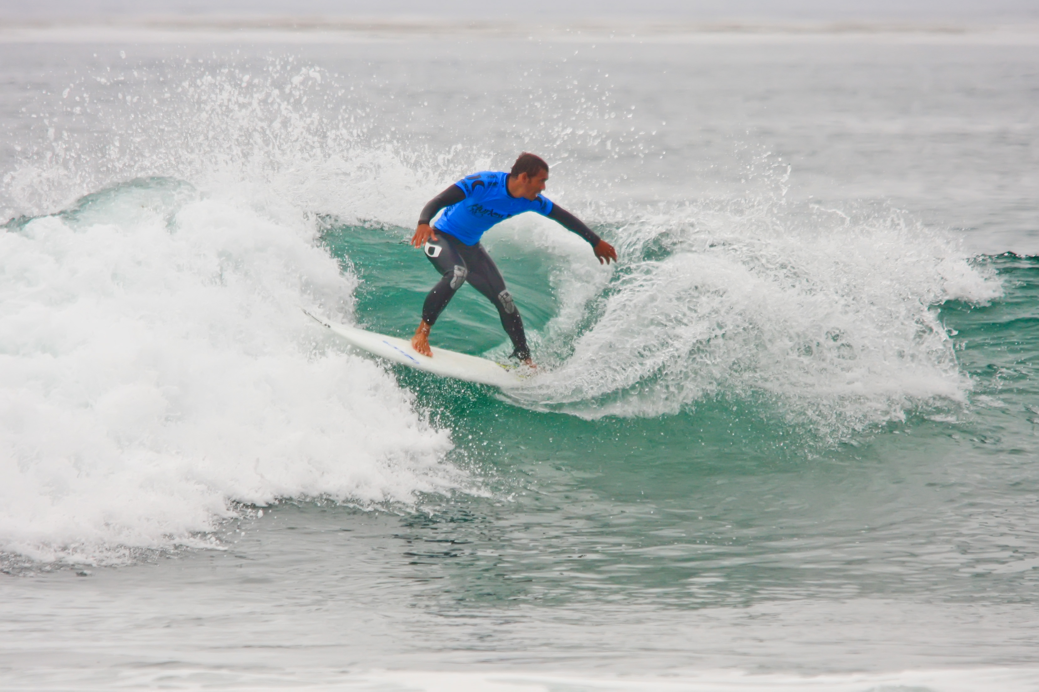 Jadson André surfando em 2010.